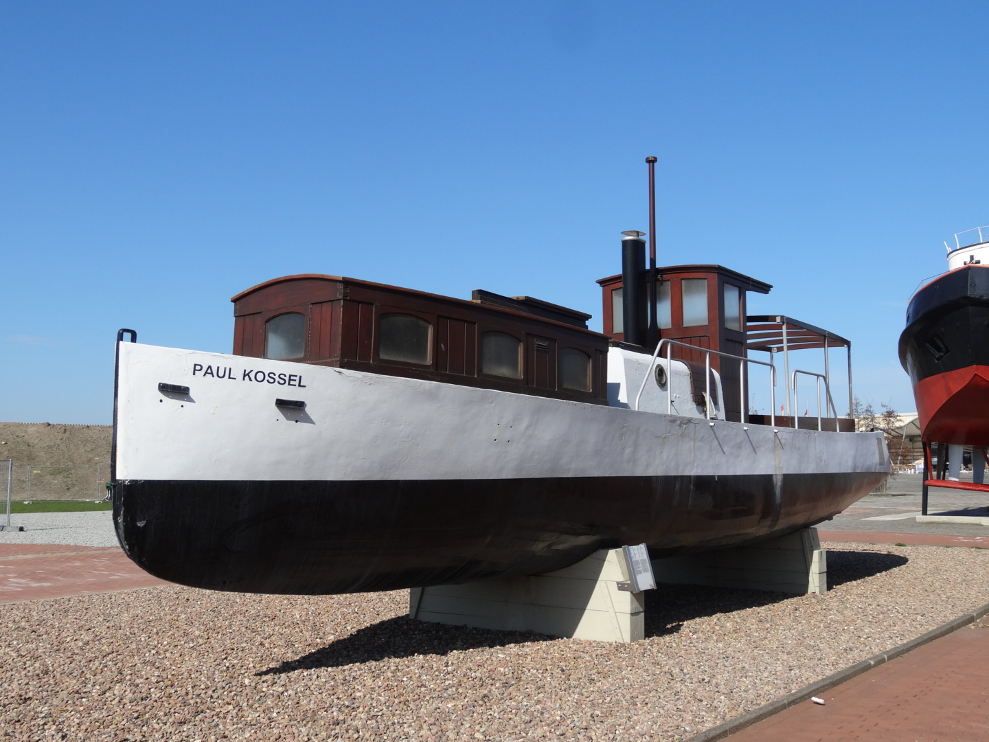 Deutsches Schiffahrtsmuseum, Betonschiff "Paul Kossel" auf dem Aussengelände